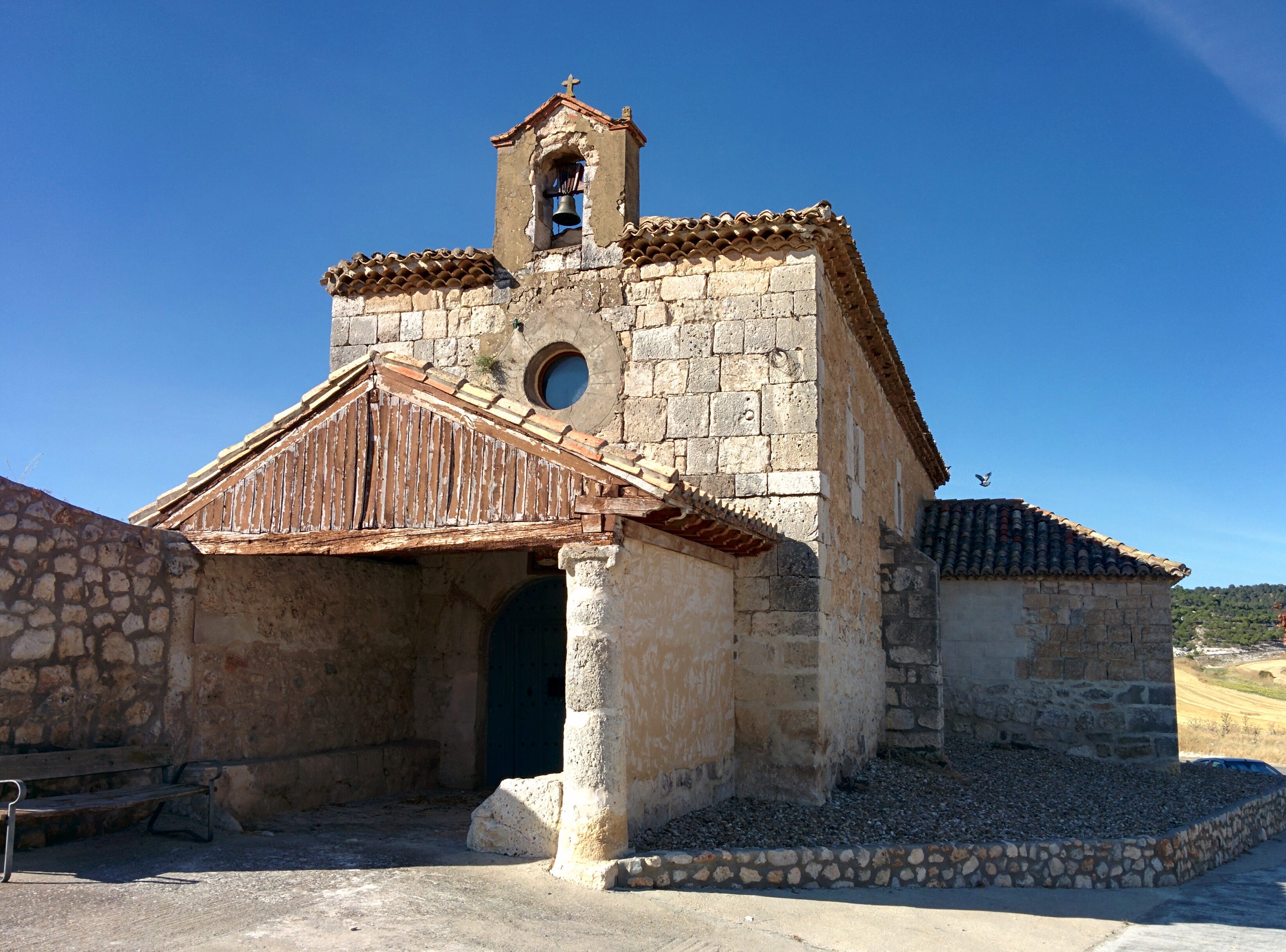 Ermita del Bendito Cristo, en Valle de Cerrato (Palencia, España).